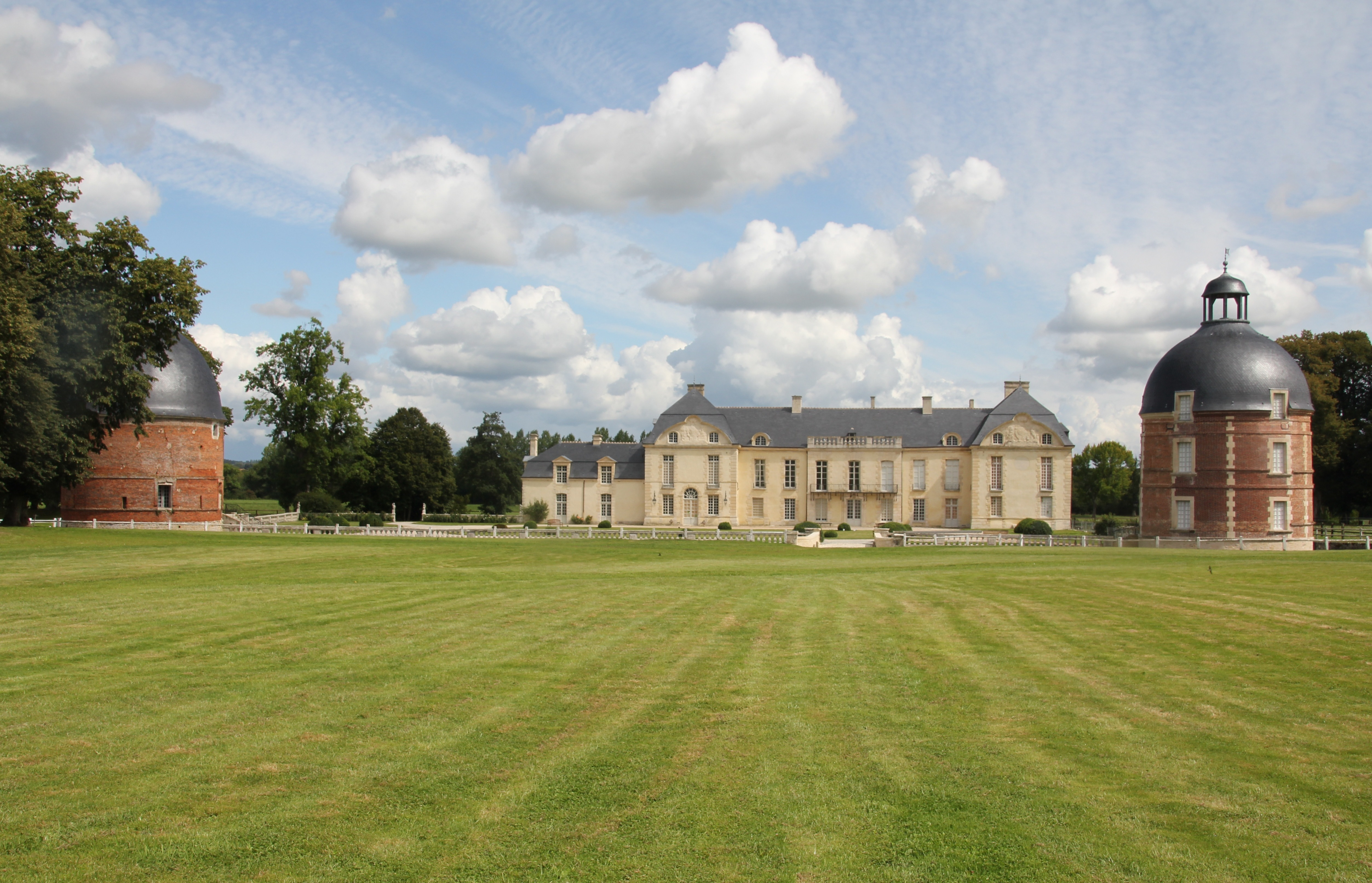 Médavy se plaint d’avoir eu le cordon Pour le bâton ; Que ne fait-il comme les autres font : Perdre les batailles, Faire rien qui vaille, Tout du pis qu’il pourra, Sans doute il l’aura. Site de Renaud Camus : bio-bibliographie, journal , Le Jour ni l’Heure, chronologie, livres & textes en ligne (librairie/bookshop) , site du château de Plieux (histoire, description, conditions de visite), tableaux , etc.